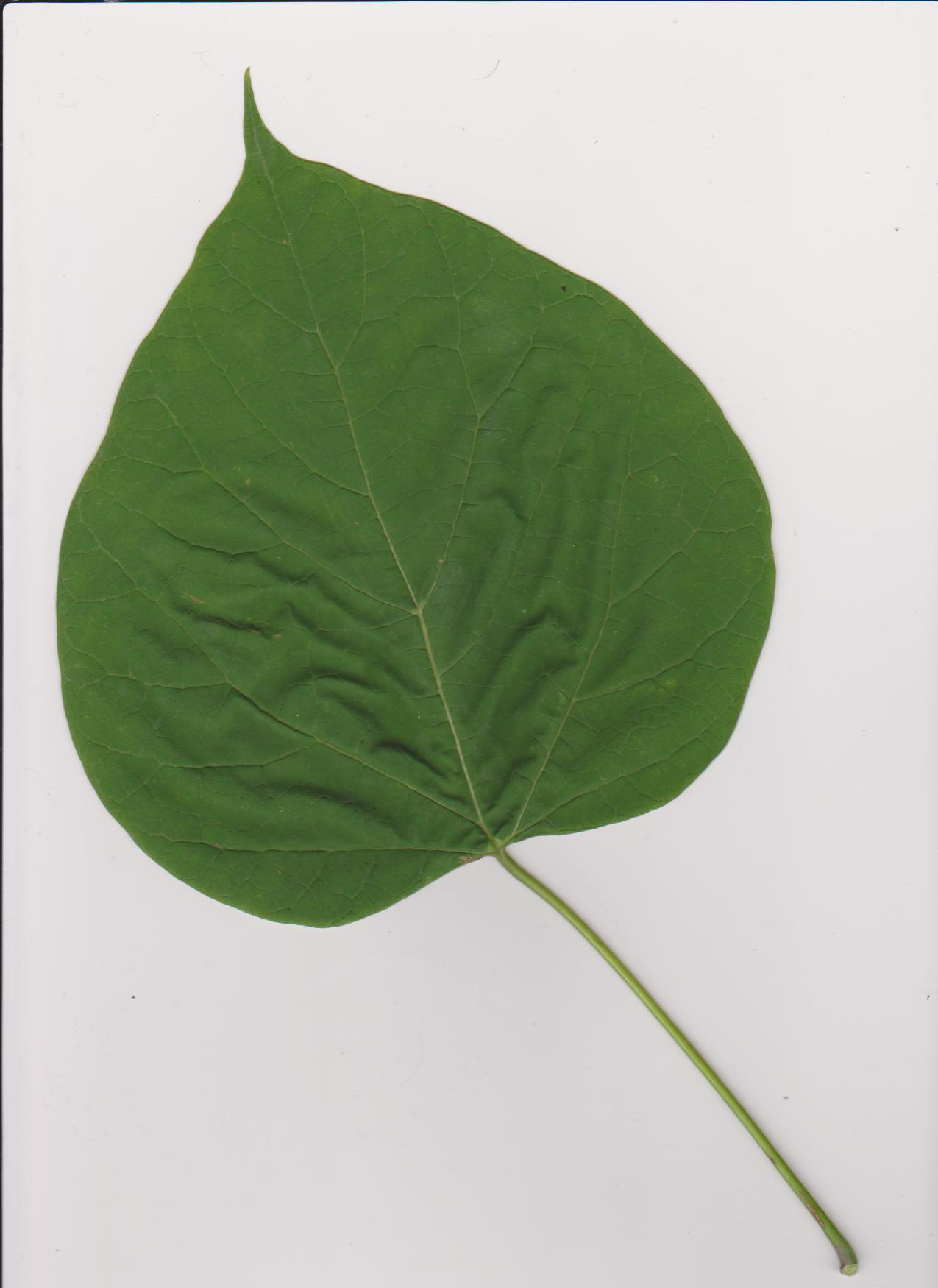 Liść Surmii wielokwiatowej (Surmia okazała)